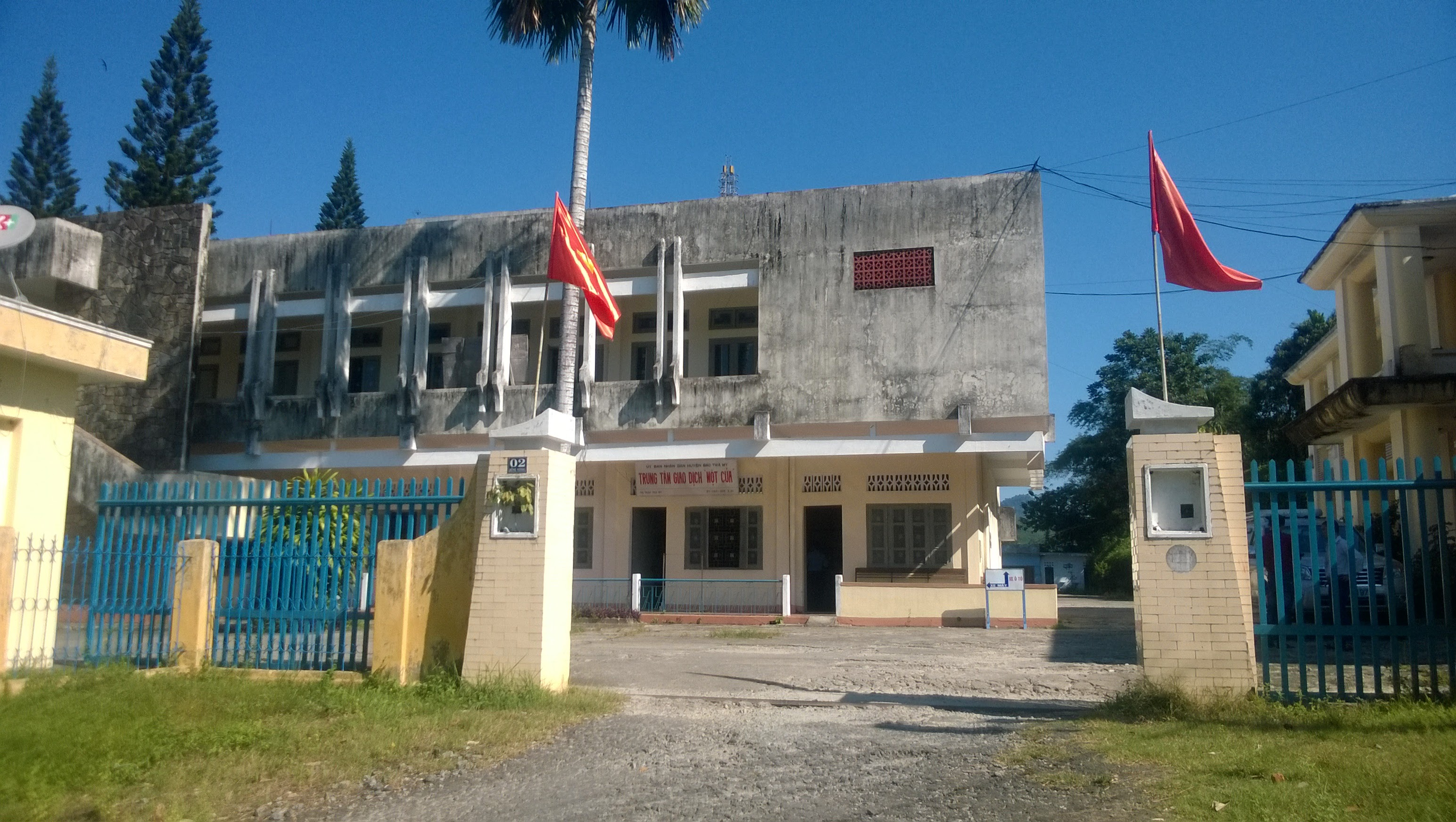 UBND huyện Bắc Trà My, Quảng Nam